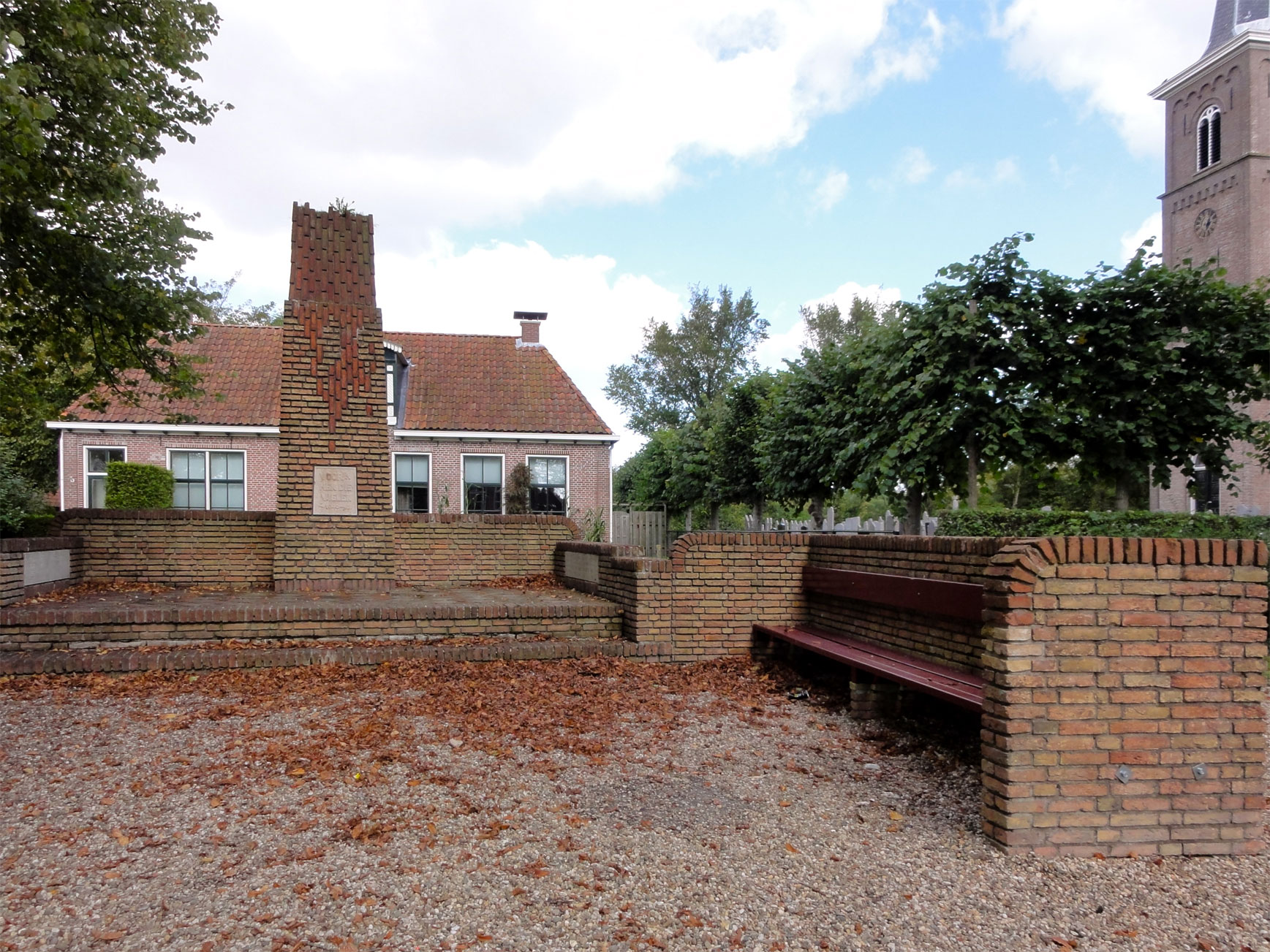 Oorlogsmonument hoek De Groedse/Tsjerkestrjitte in Ternaard NL (D.Reitsma en R. Ybema)